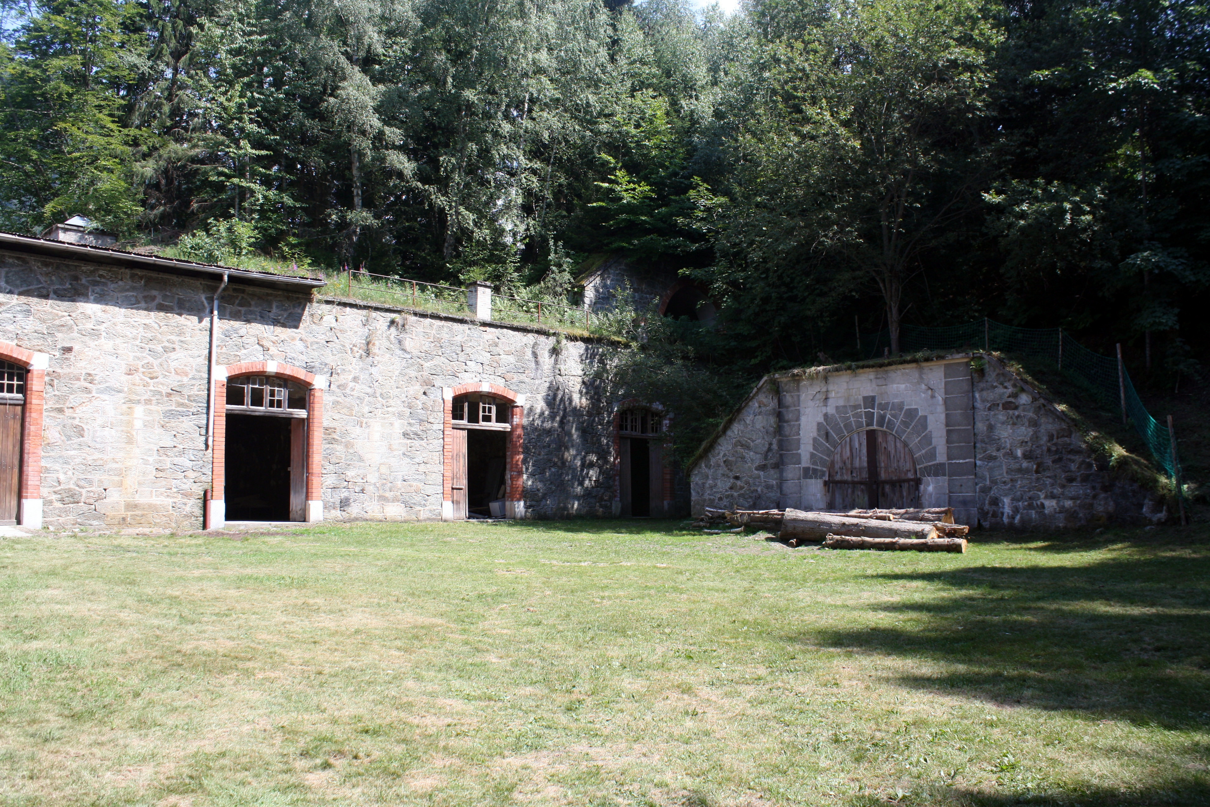 La cour supérieur du fort du Mont.